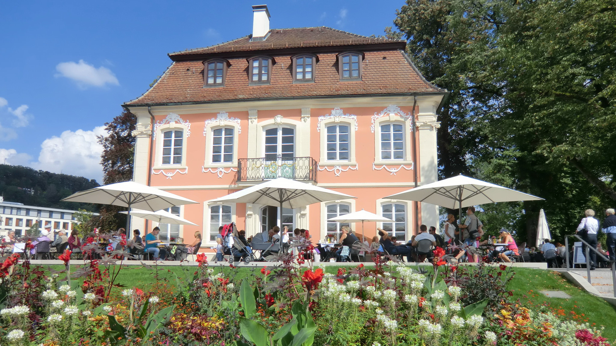 Stahlsches Schlösschen ("Rokokoschlösschen"), Schwäbisch Gmünd